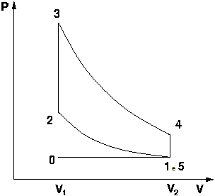 Diagrama Pressão x Volume de um ciclo ideal de Otto